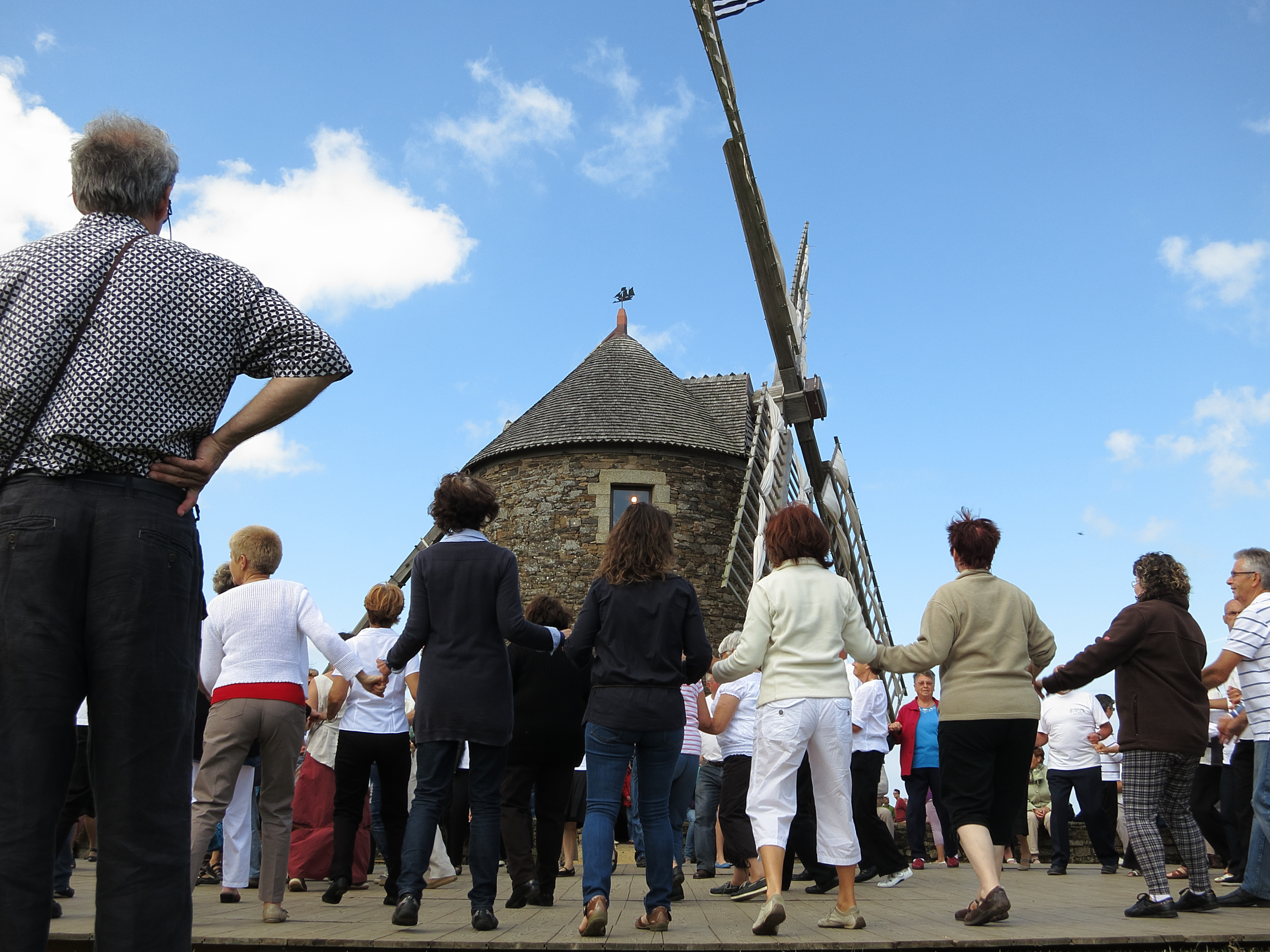 "Fest-noz" (Volkstanz) in der Bretagne, hier auf dem Gelände der Mühle von Craca (Nähe Plouézec)